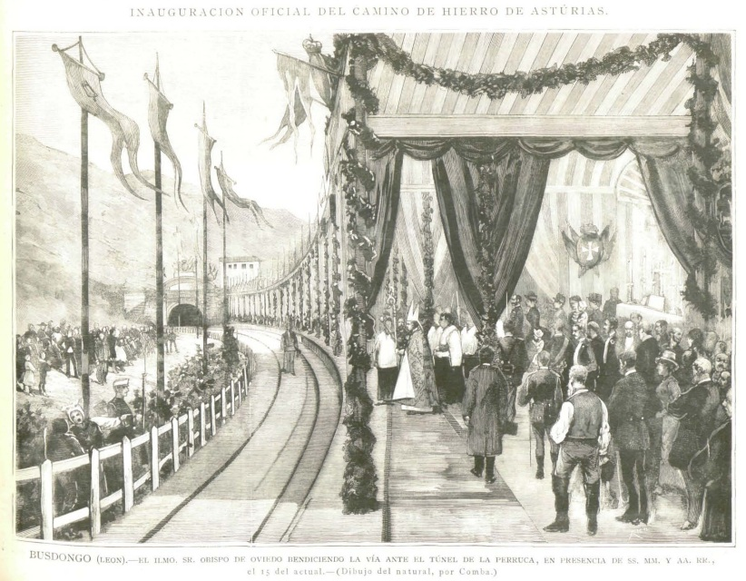 El ilustrísimo señor obispo de Oviedo bendiciendo la vía ante el túnel de la Perruca, en presencia de SS.MM y AA.RR, el 15 del actual (Dibujo del natural por Comba).